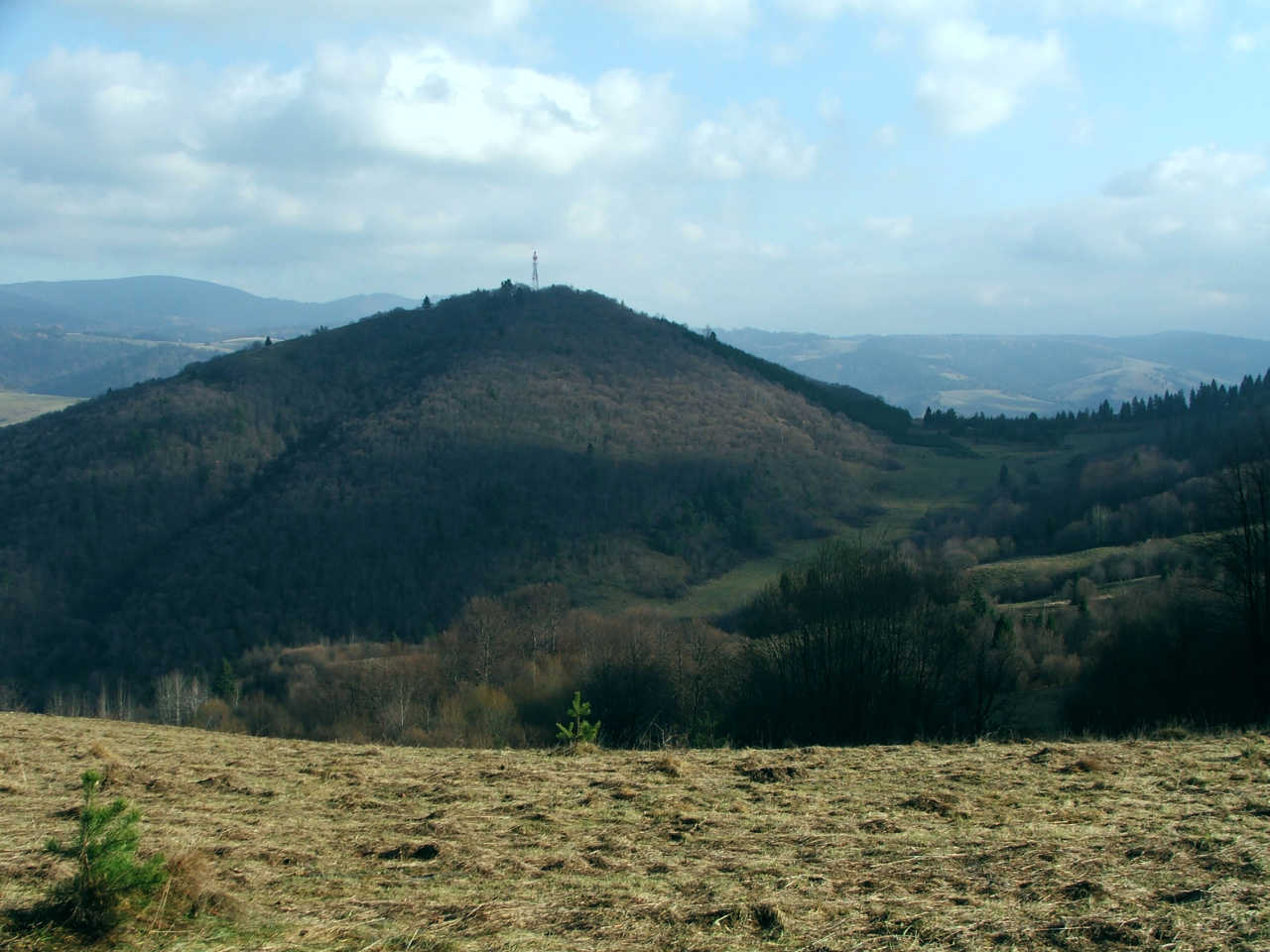 Jarmuta (Małe Pieniny)